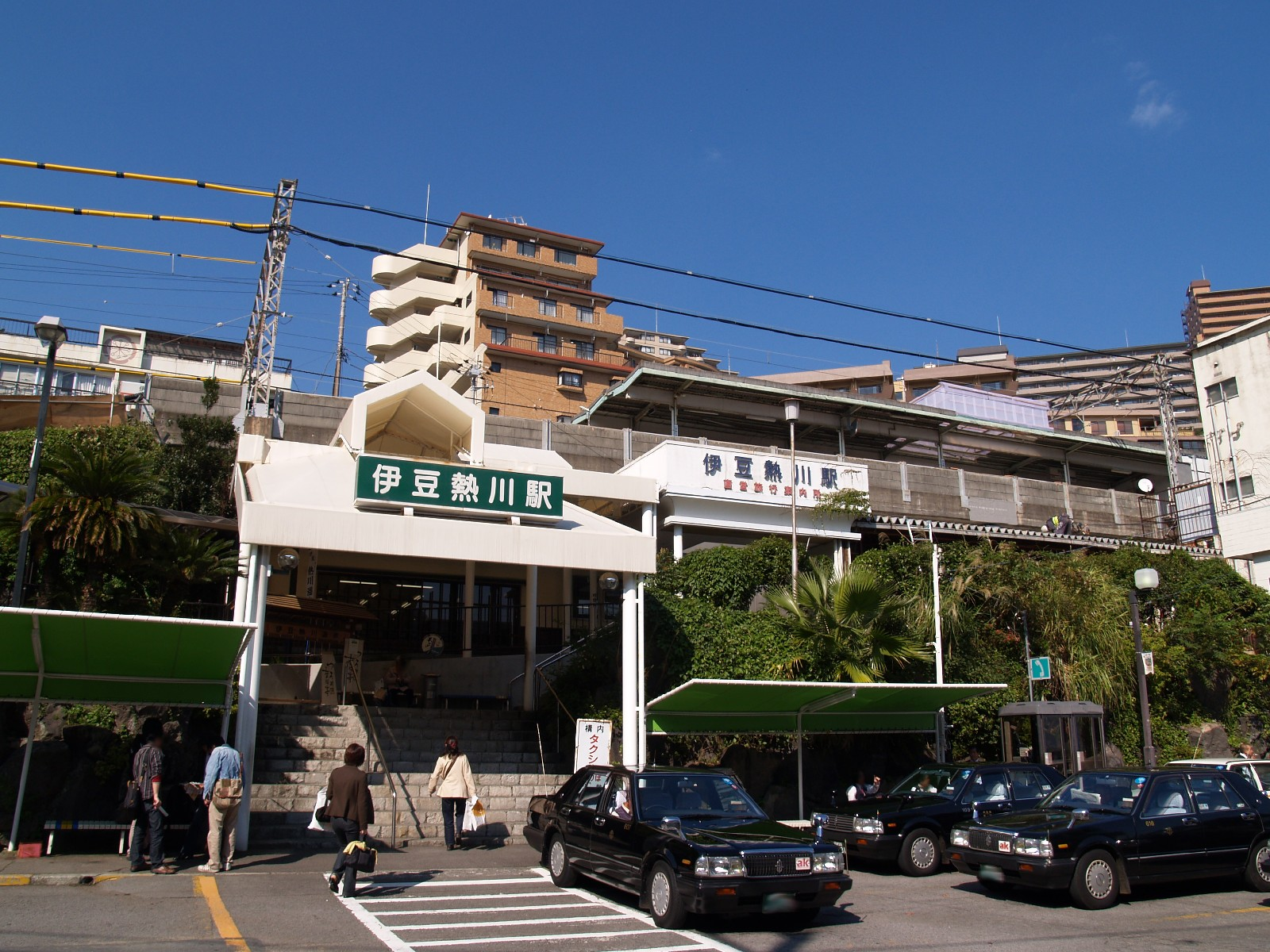 伊豆熱川駅